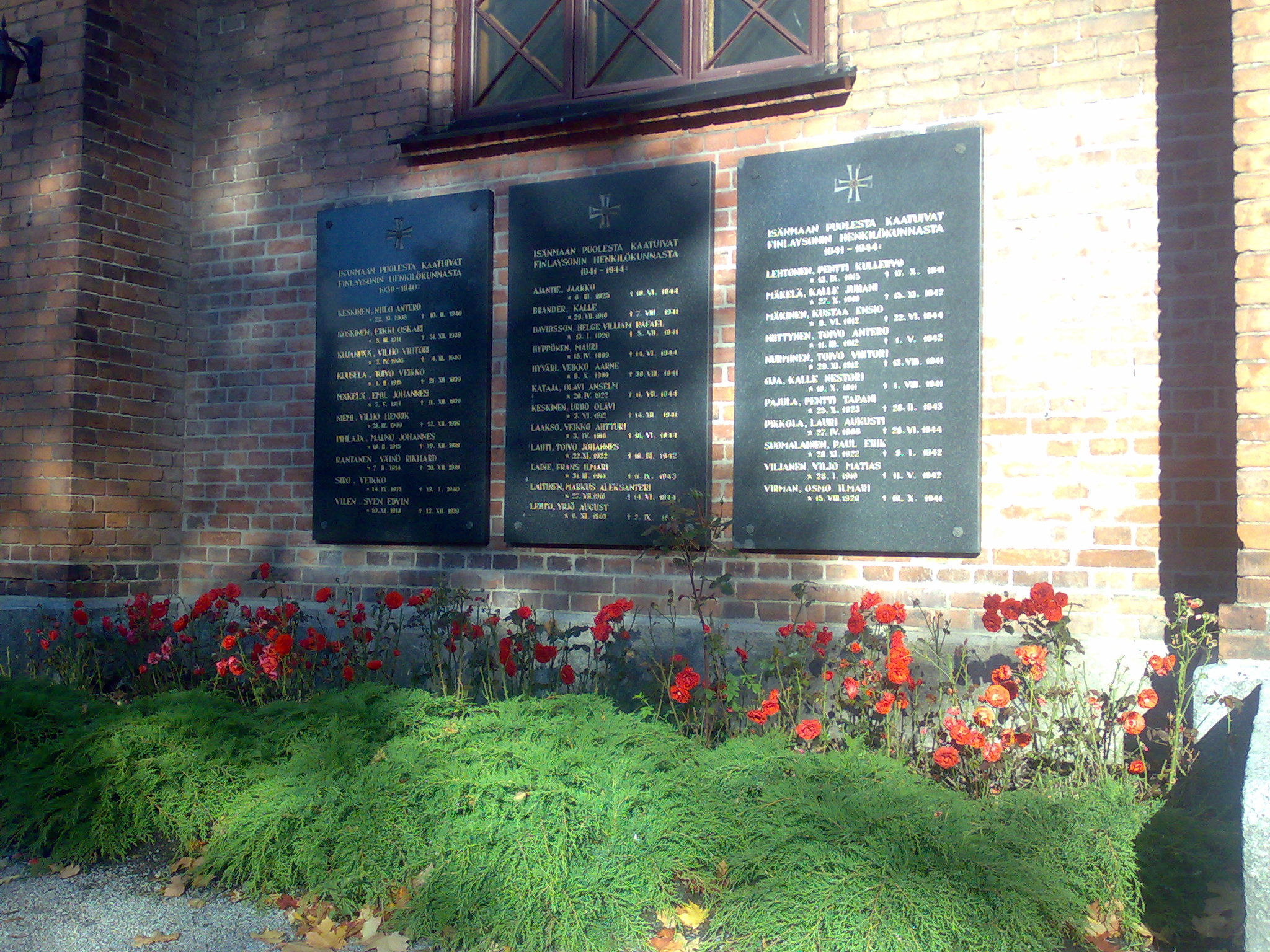 Finlaysonin kirkko, muistolaatat